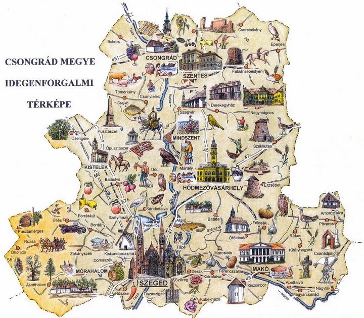 Les patrimoins touristiques du Département Csongrád